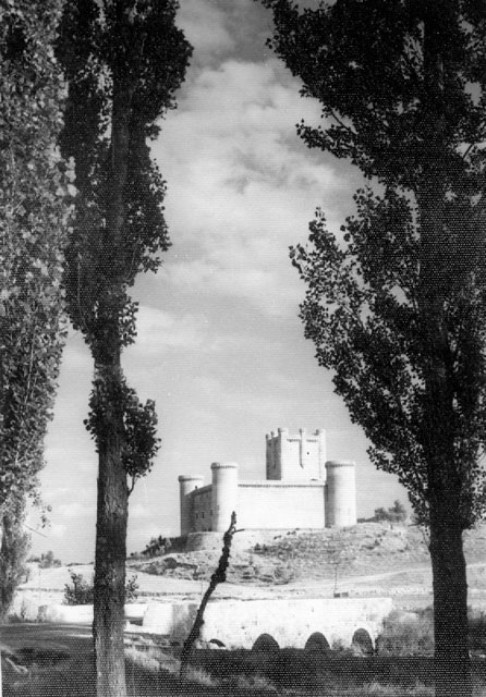 Castillo - Torrelobatón (Valladolid) - Fotografía. Papel 75 x 105 mm B/N